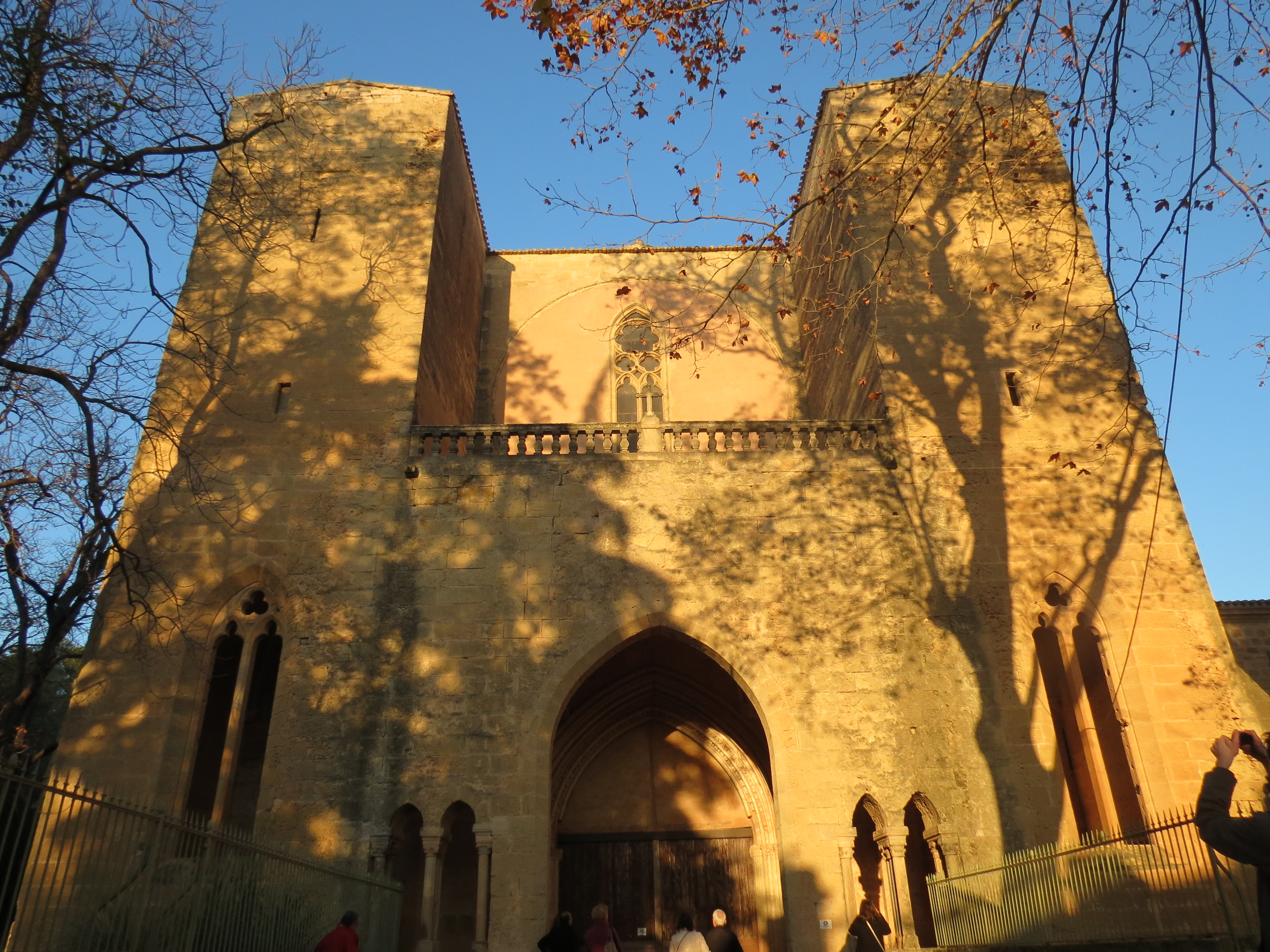 Vue de la façade et portail ouest de l'abbatiale